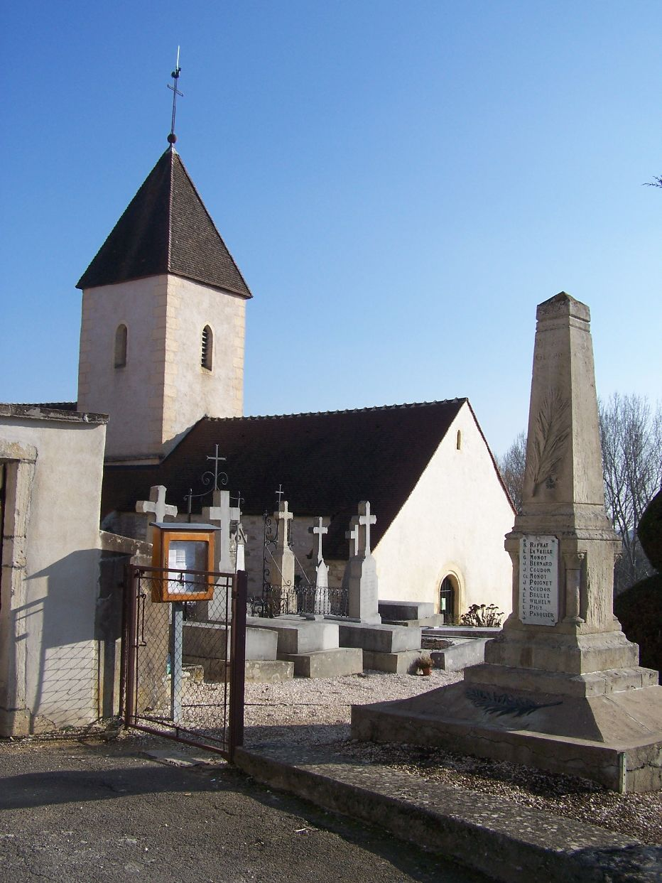 vallée de la NORGES 21